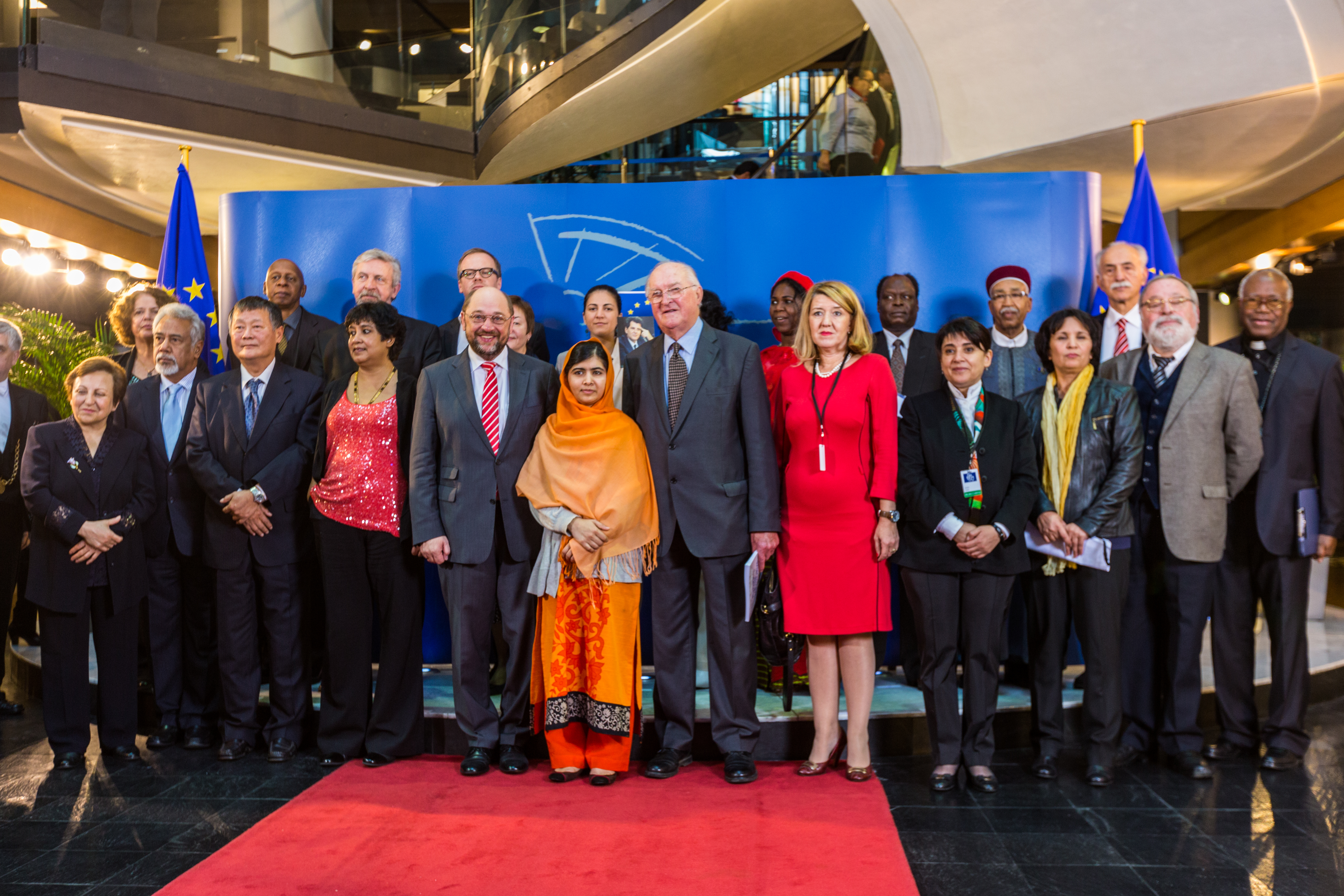 Photo de famille lors de la remise du 25e prix Sakharov à à Malala Yousafzai Strasbourg 20 novembre 2013